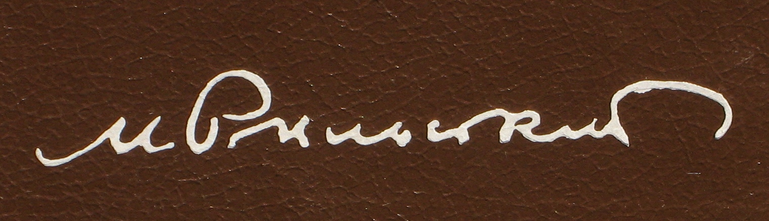 Soviet poet Maxim Rylsky signature.